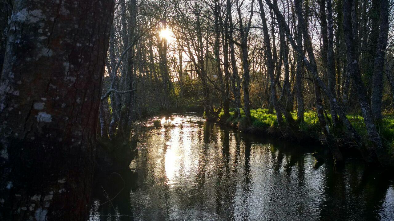 O río Cabalar ao seu paso por Présaras